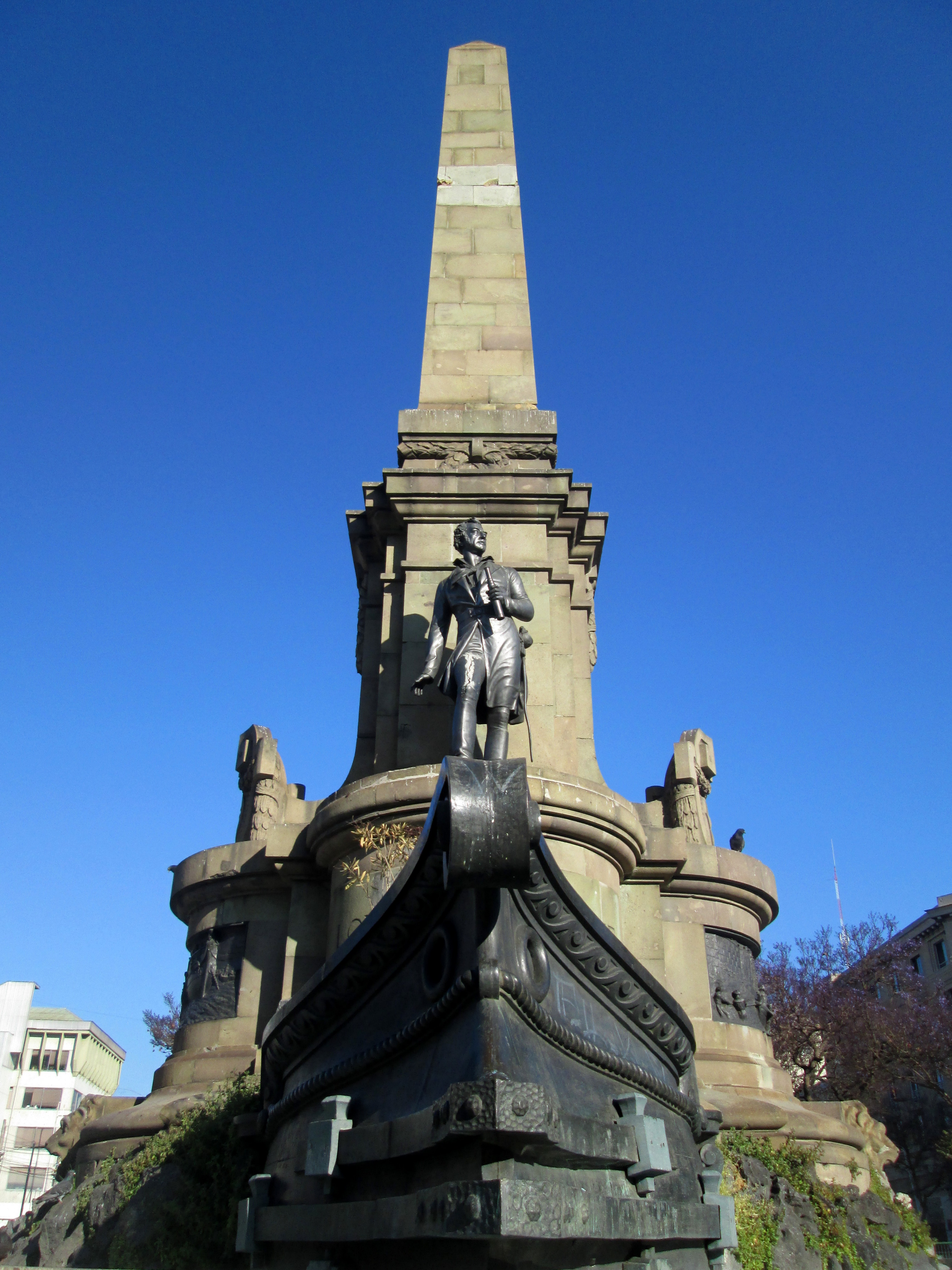 Monumento a Lord Cochrane